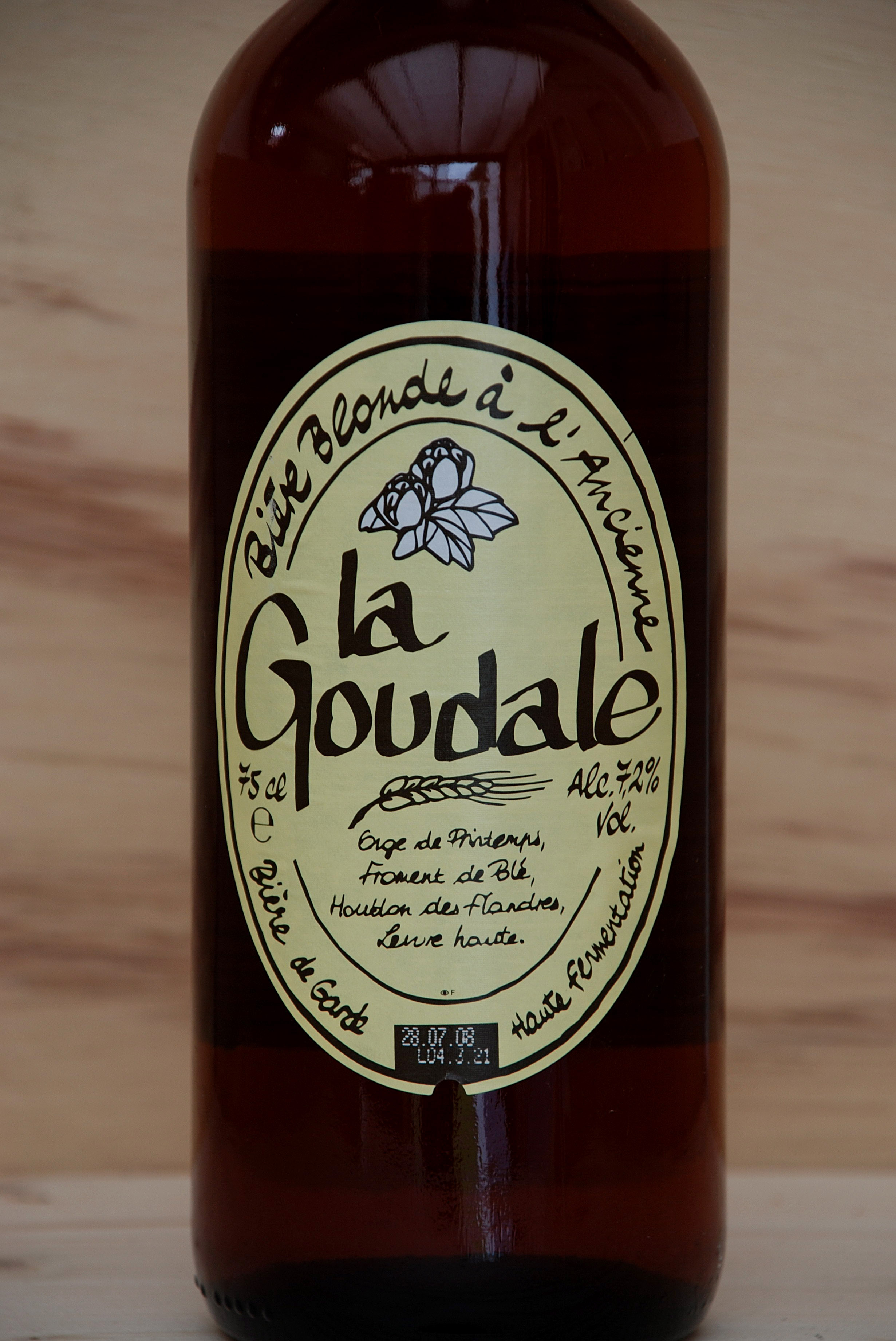 La Goudale